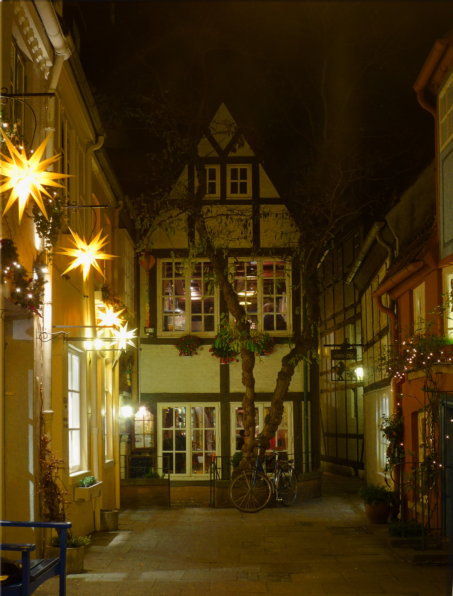 Schnoor-Viertel in Bremen, Schnoor 36 / Wüstestätte 6, Blick nach NordostenDas abgebildete Objekt ist ein geschütztes Kulturdenkmal in der Freien Hansestadt Bremen, mit der Nr. 1398 beim Landesamt für Denkmalpflege registriert.